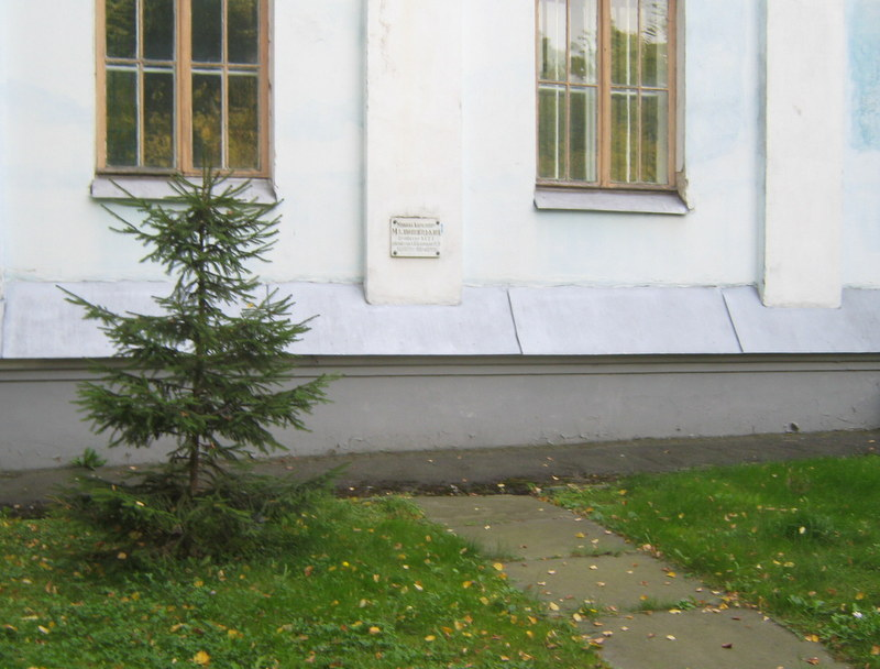 Місце поховання Миколи Малющицького